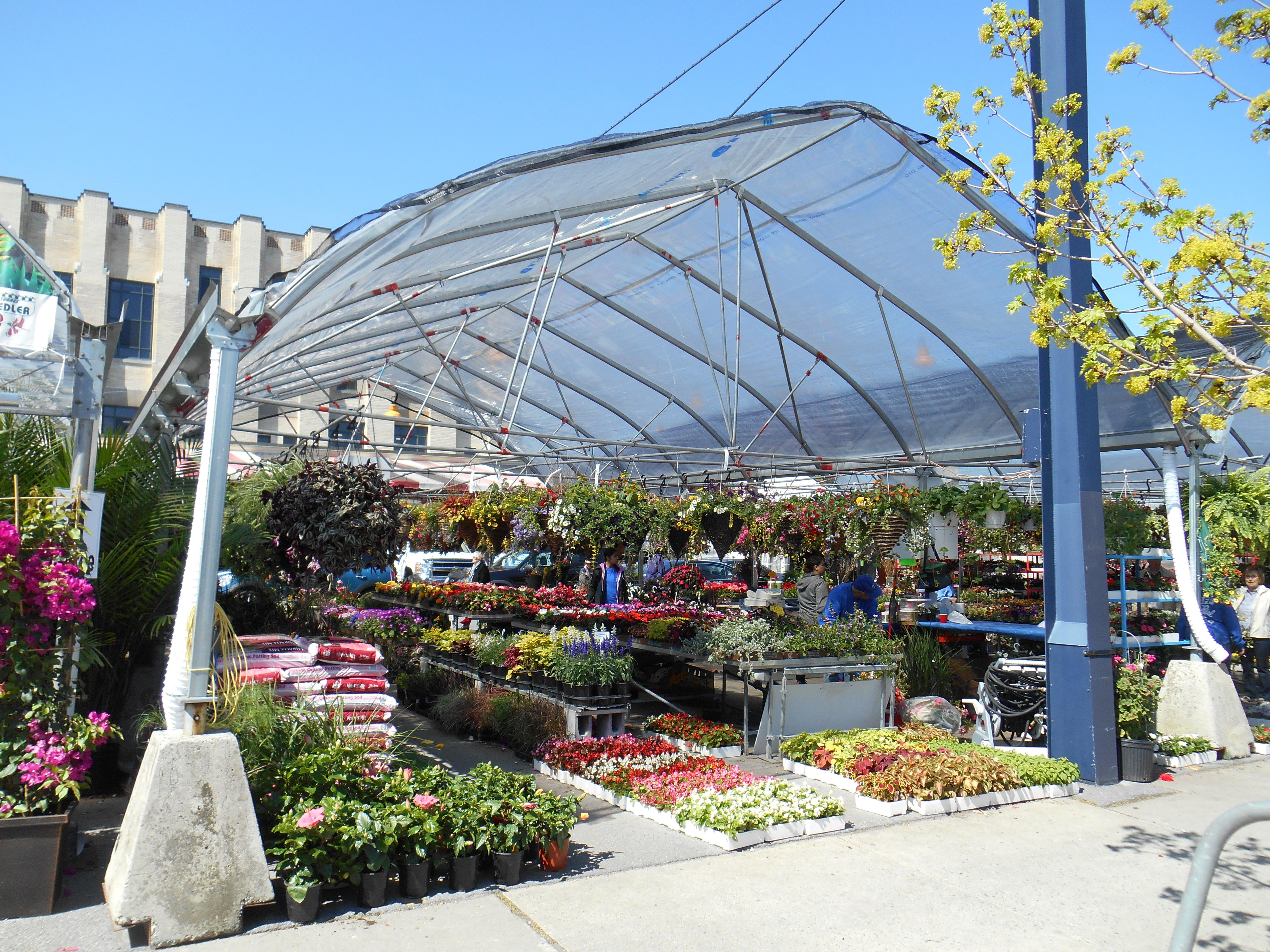 Marché Atwater, Montréal